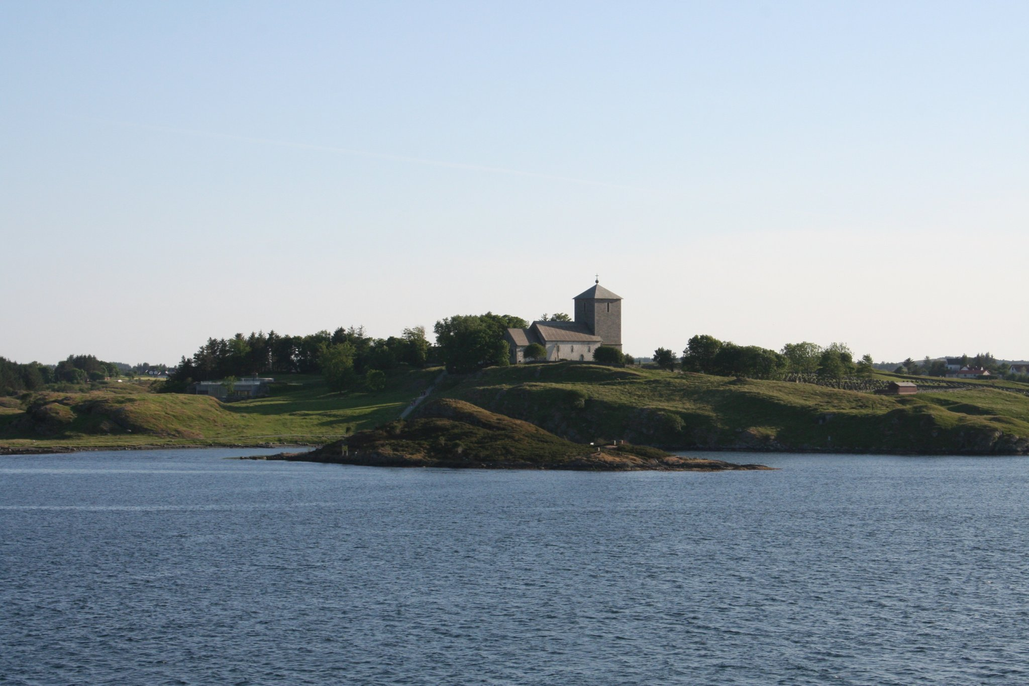 St. Olav in Avaldsnes, Karmøy, Rogaland, Norway